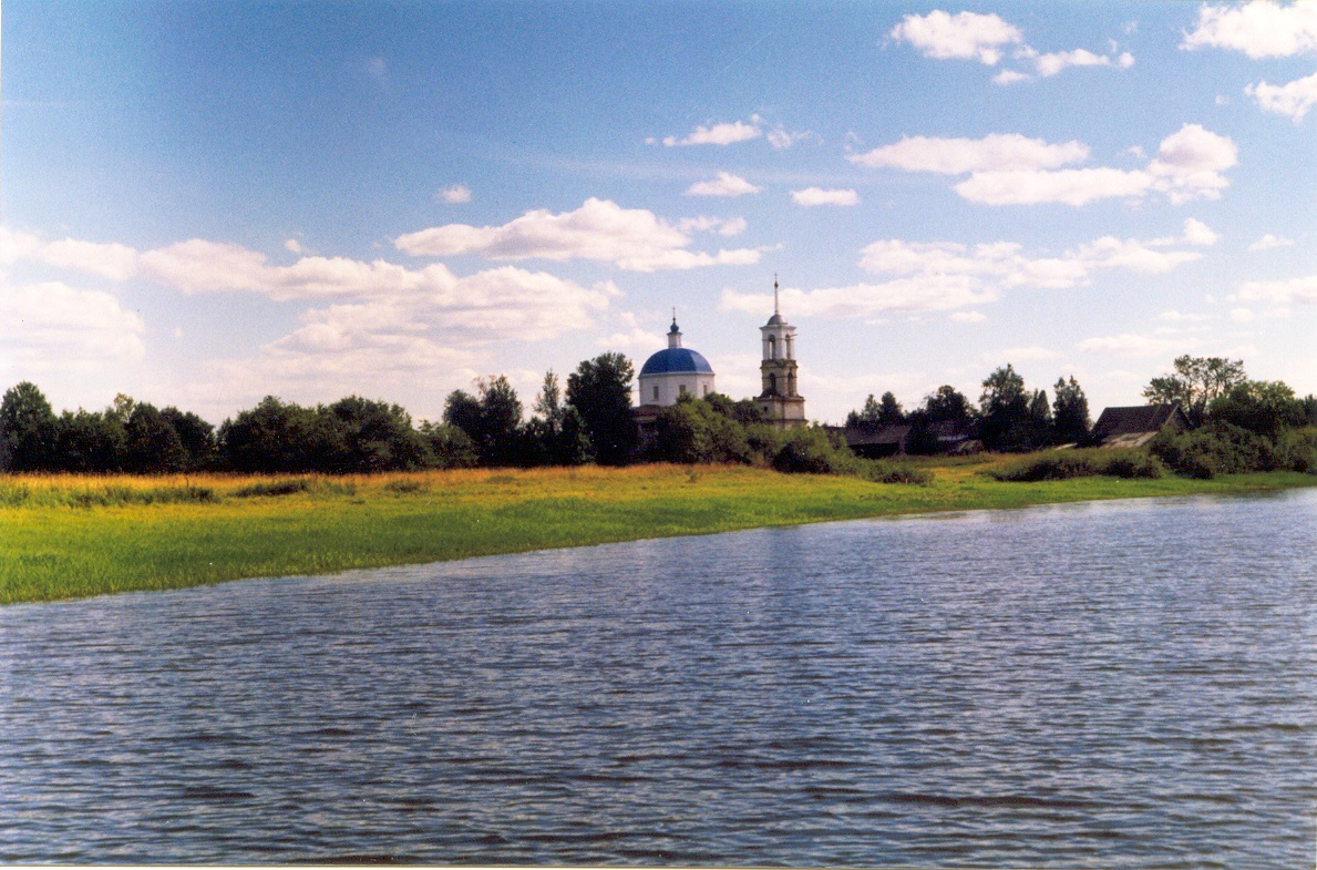 Церковь Рождества Богородицы (Тверская область, Пеновский район, деревня Вселуки)